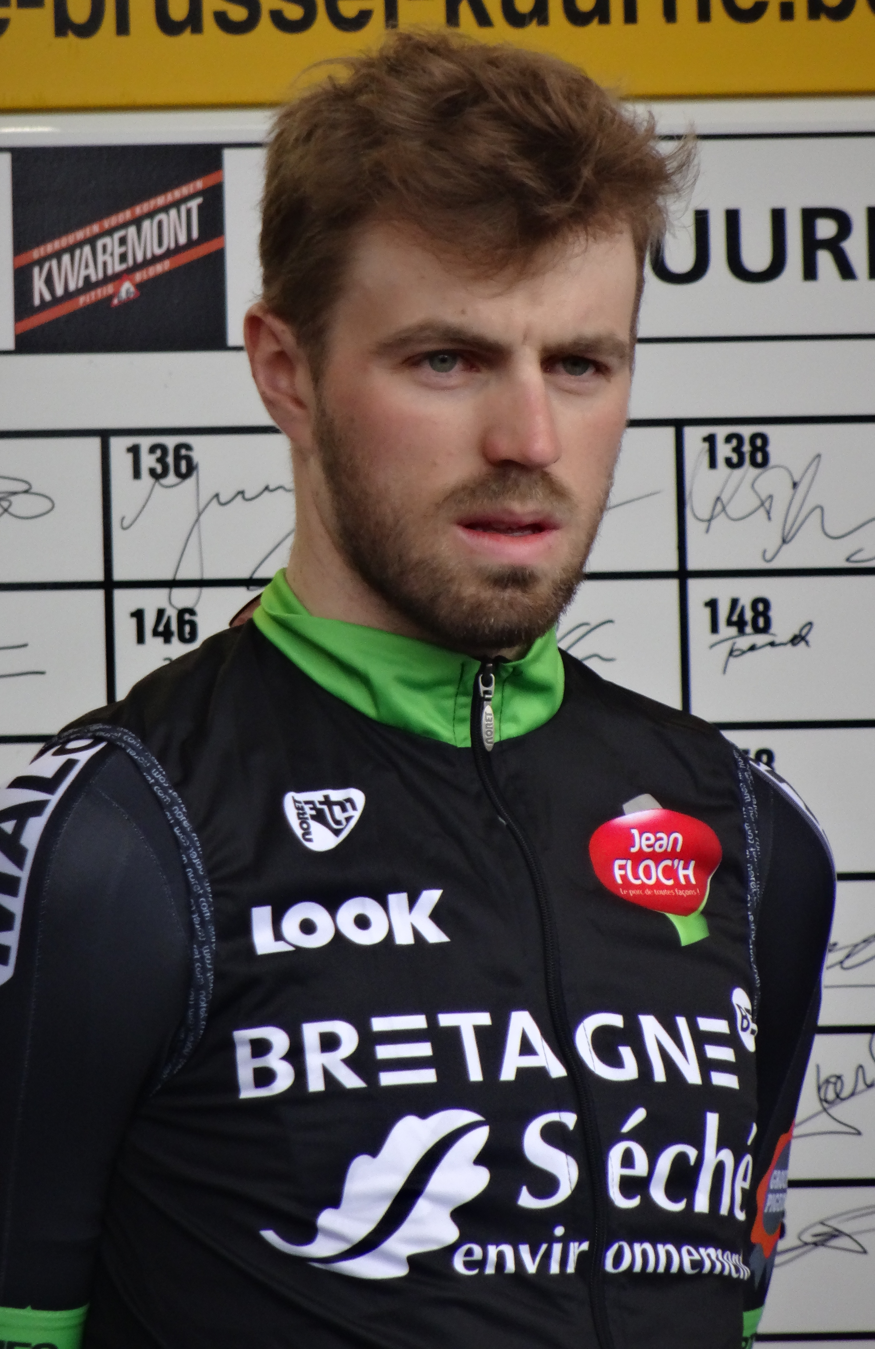 Reportage réalisé le dimanche 1er mars à l'occasion du départ et de l'arrivée de Kuurne-Bruxelles-Kuurne 2015 à Kuurne, Belgique.